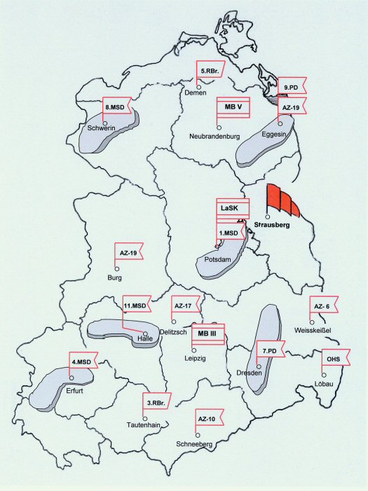 Standorte der Landstreitkräfte der NVA